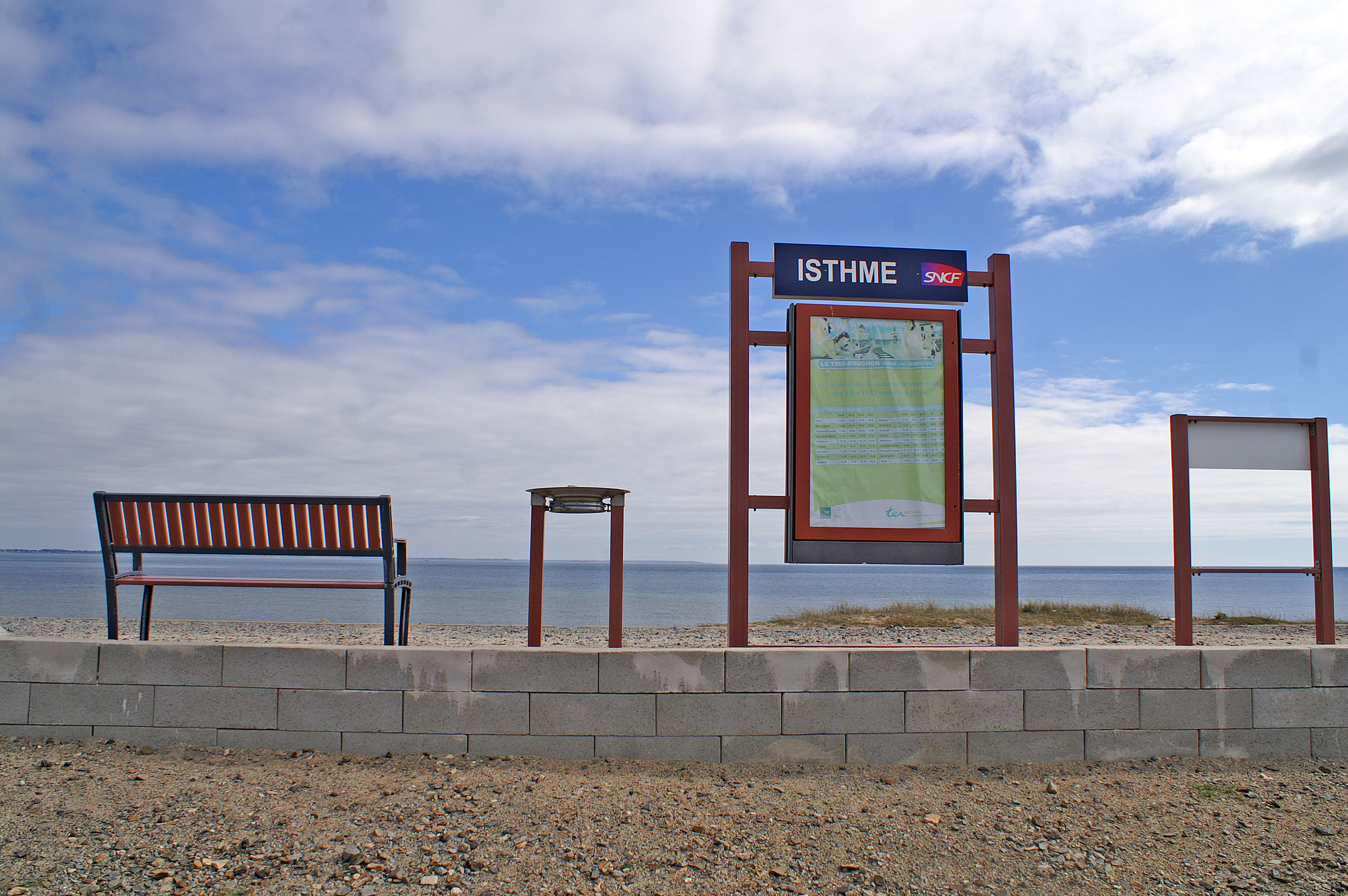 La halte et la baie de Quiberon.